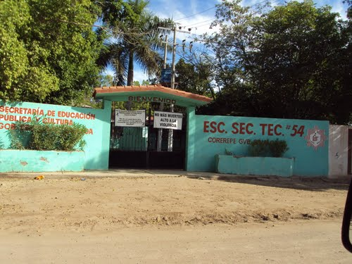 Secundaria tecnica numero 54